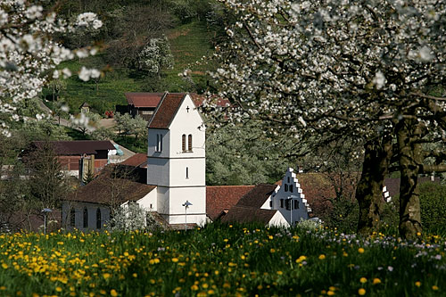 Kirche von Oltingen